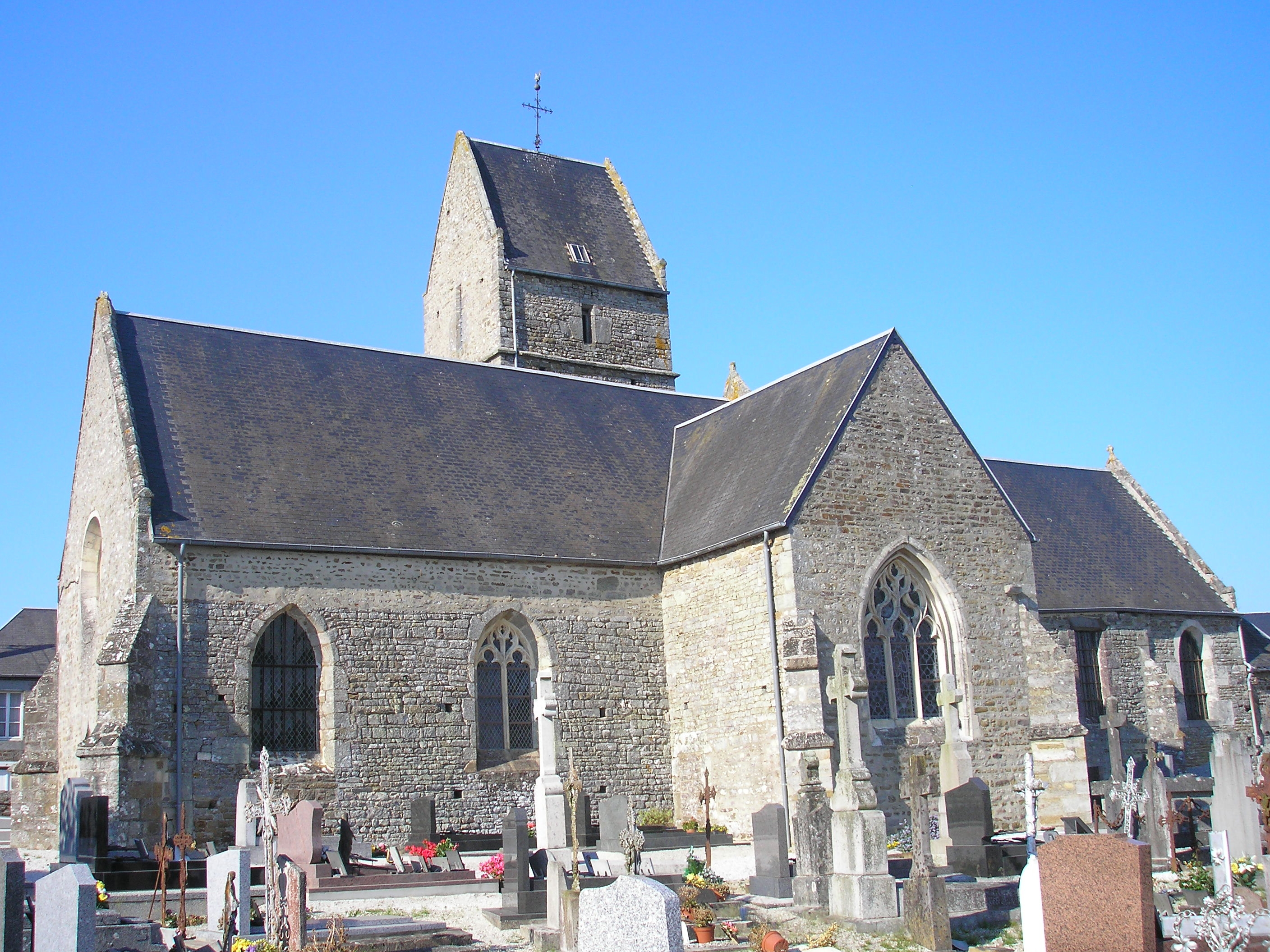 Saint-Vigor-des-Mézerets (Normandie, France). L'église Saint-Vigor.